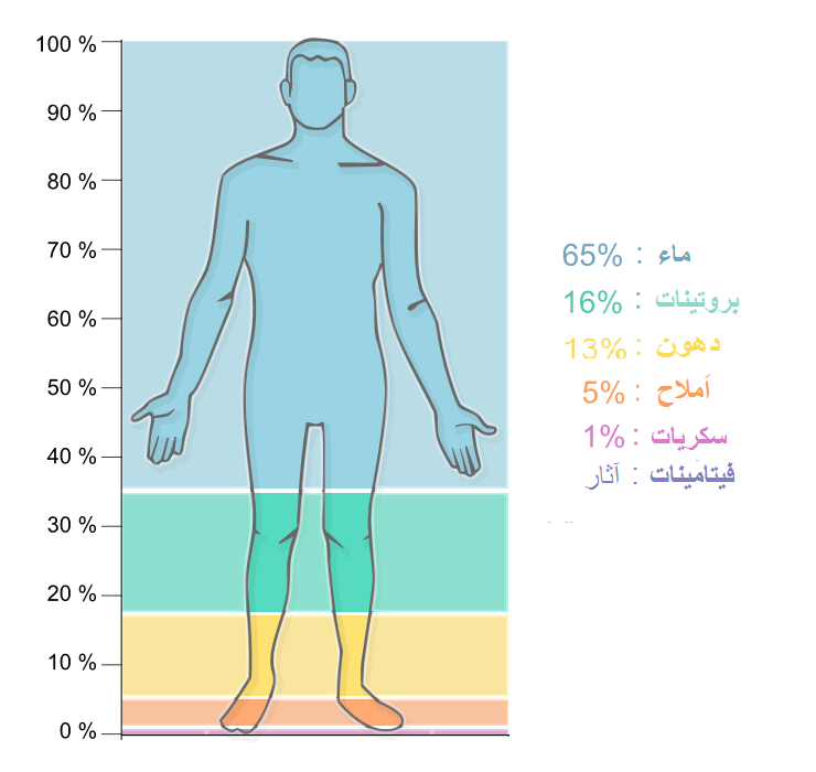 نسب المكونات الغذائية في جسم الإنسان